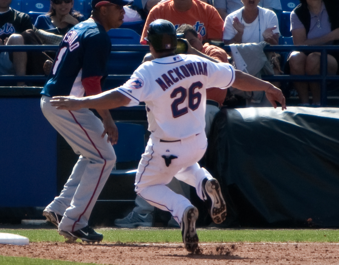 Rob Mackowiak